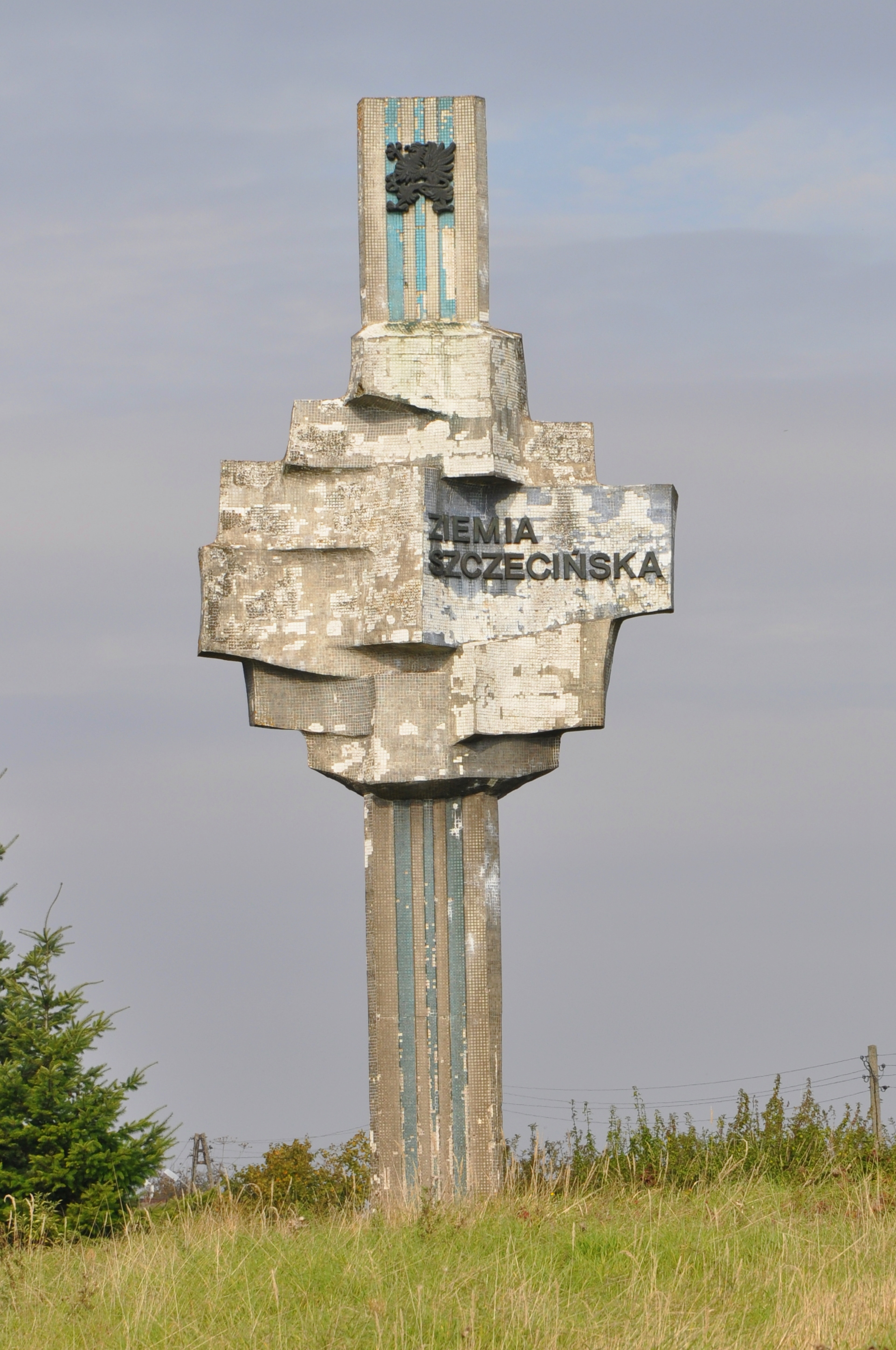 Witacz województwa szczecińskiego na wjeździe do miasta Lipiany (od południa)